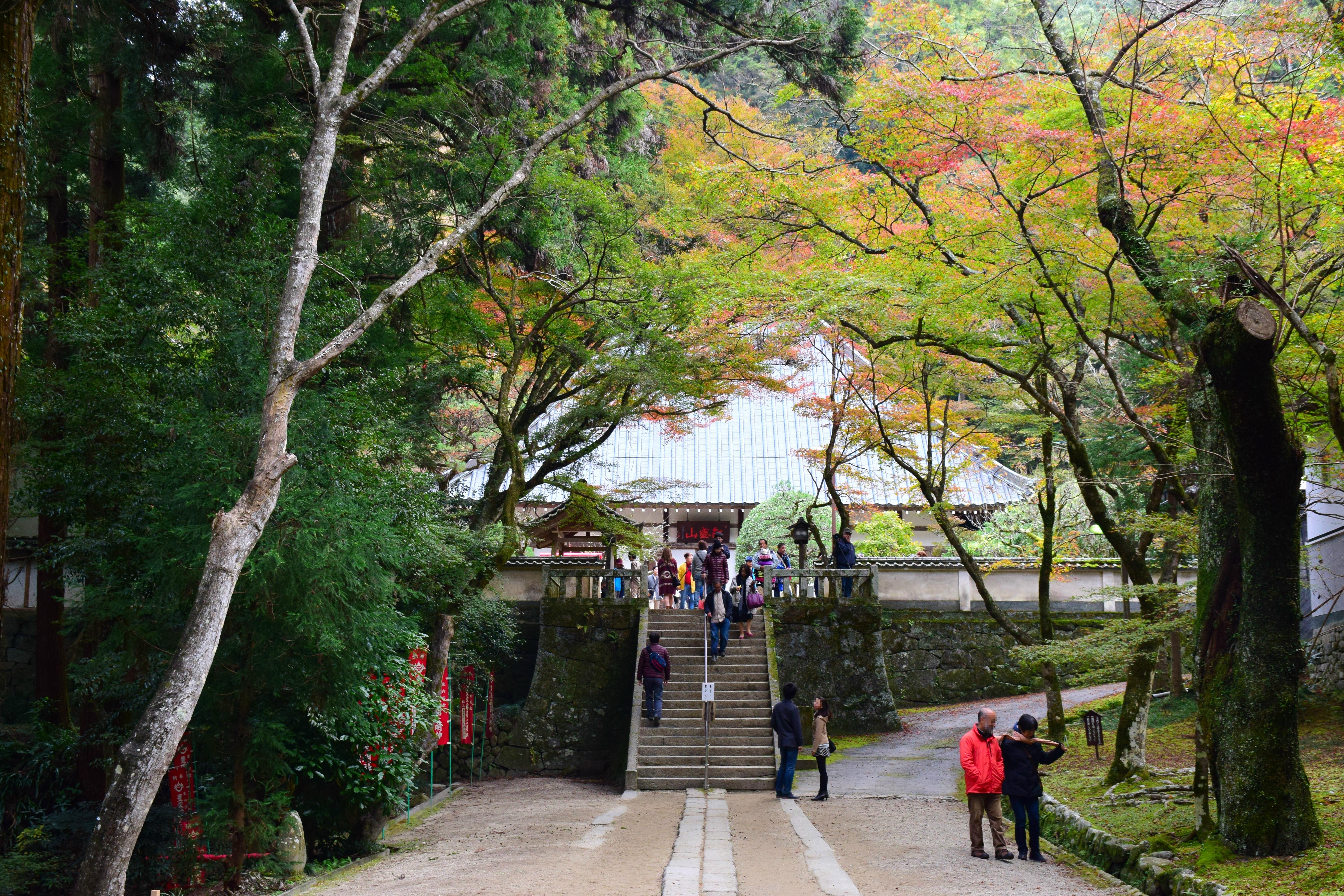 愛知県豊田市足助町の香積寺境内